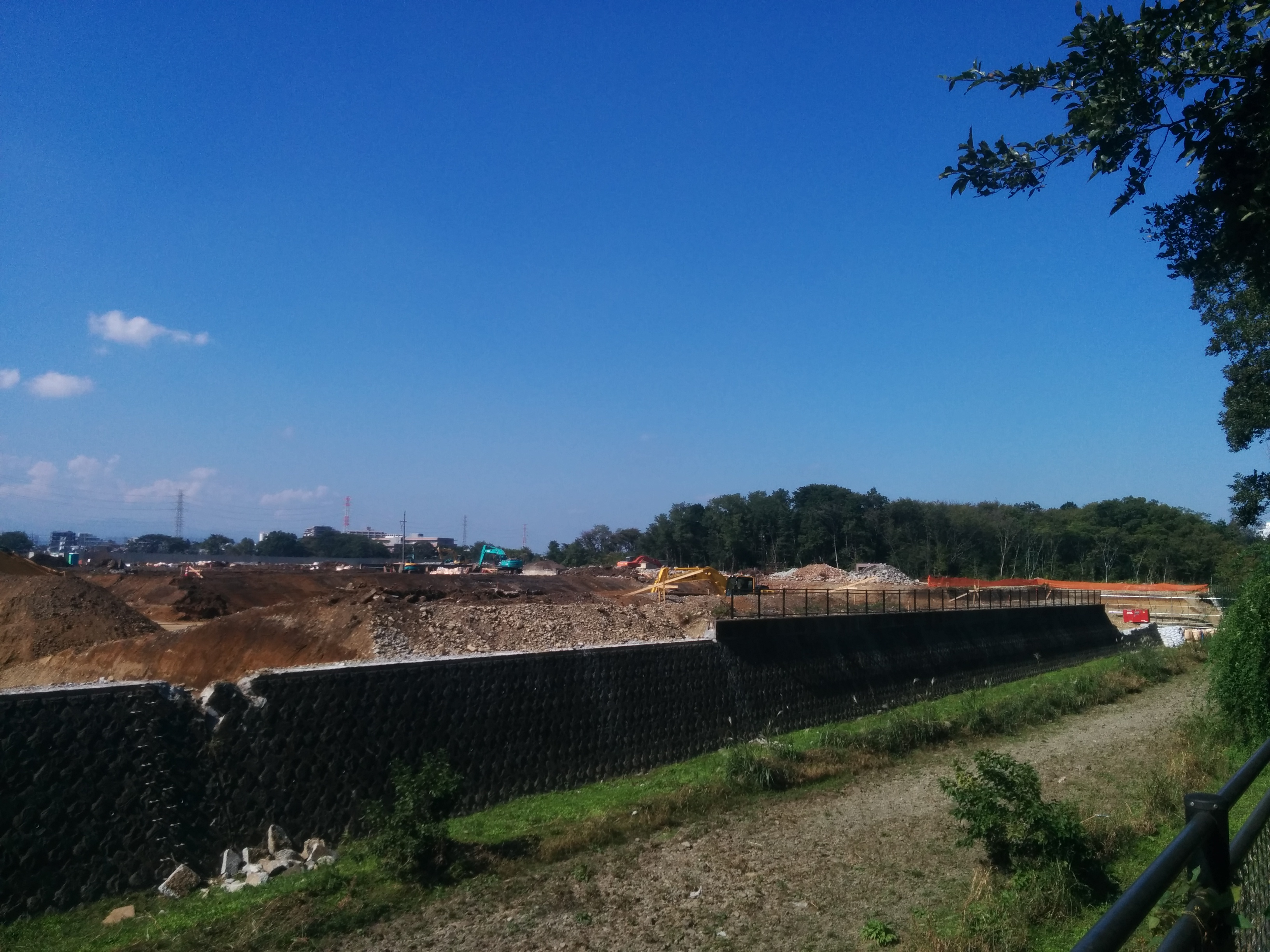 立川陸軍航空工廠跡の三本煙突跡